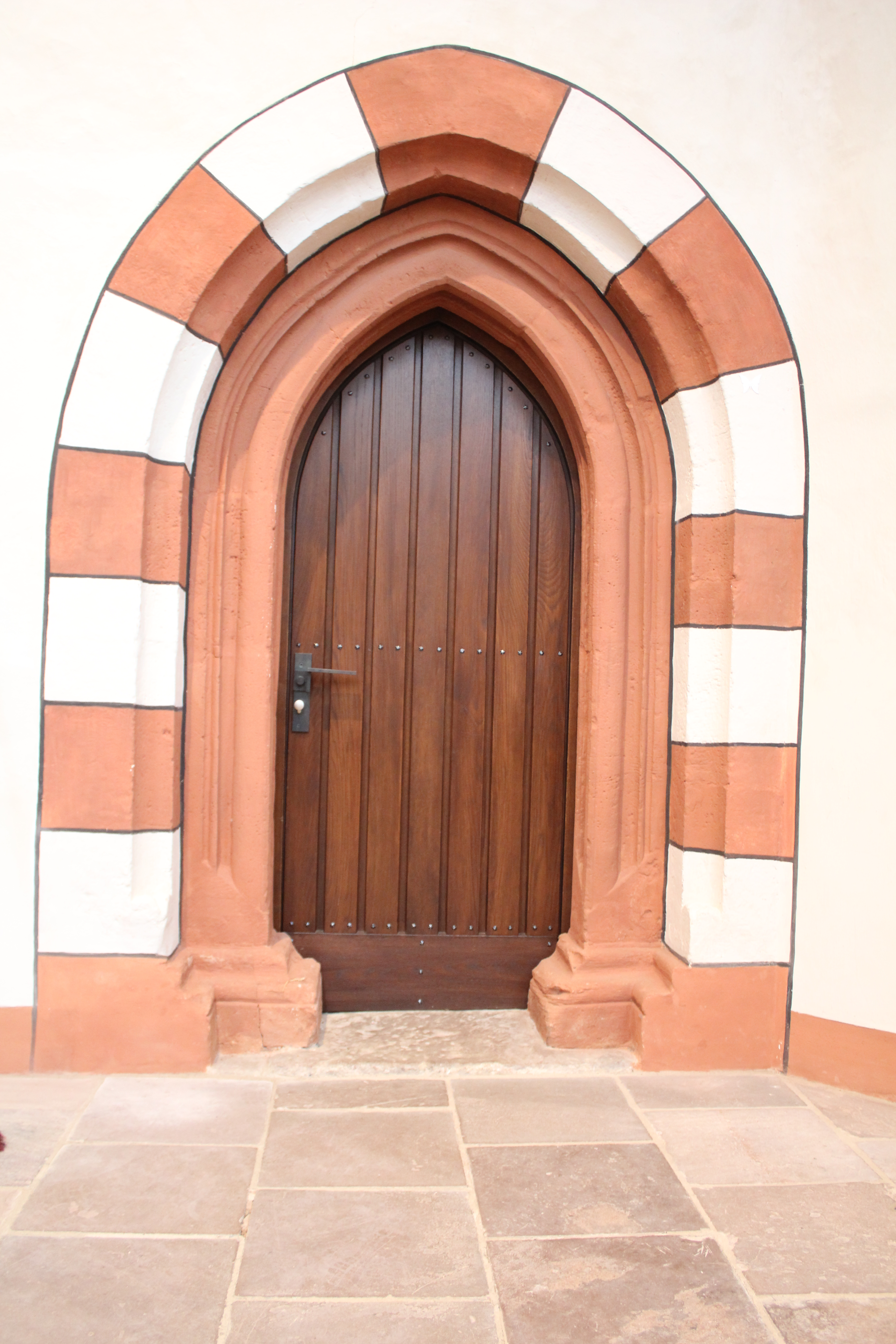 Evanglische Kirche Rüdigheim (Neuberg), Main-Kinzig-Kreis, Hessen, Deutschland